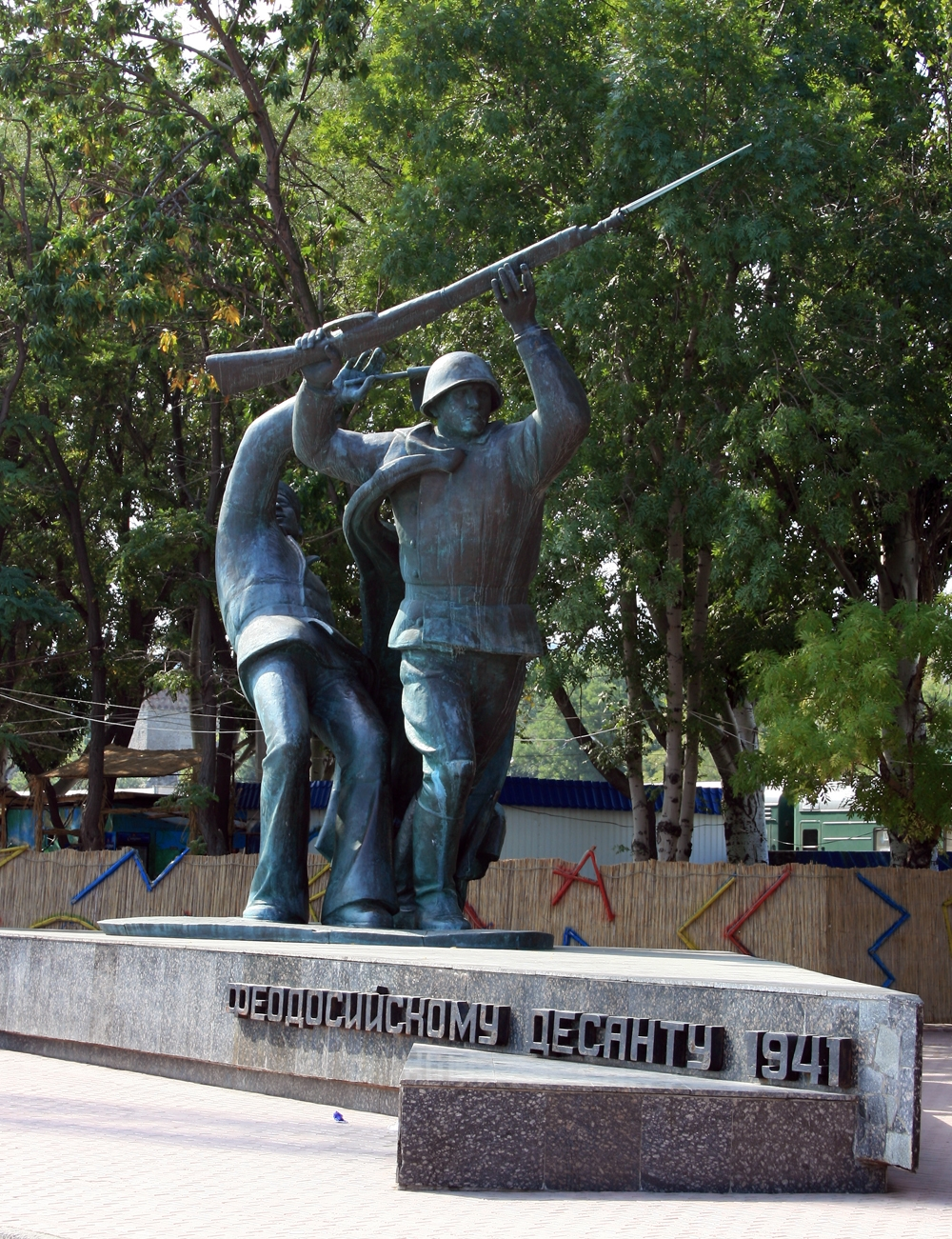 Памятник Феодосийскому десанту в Феодосии